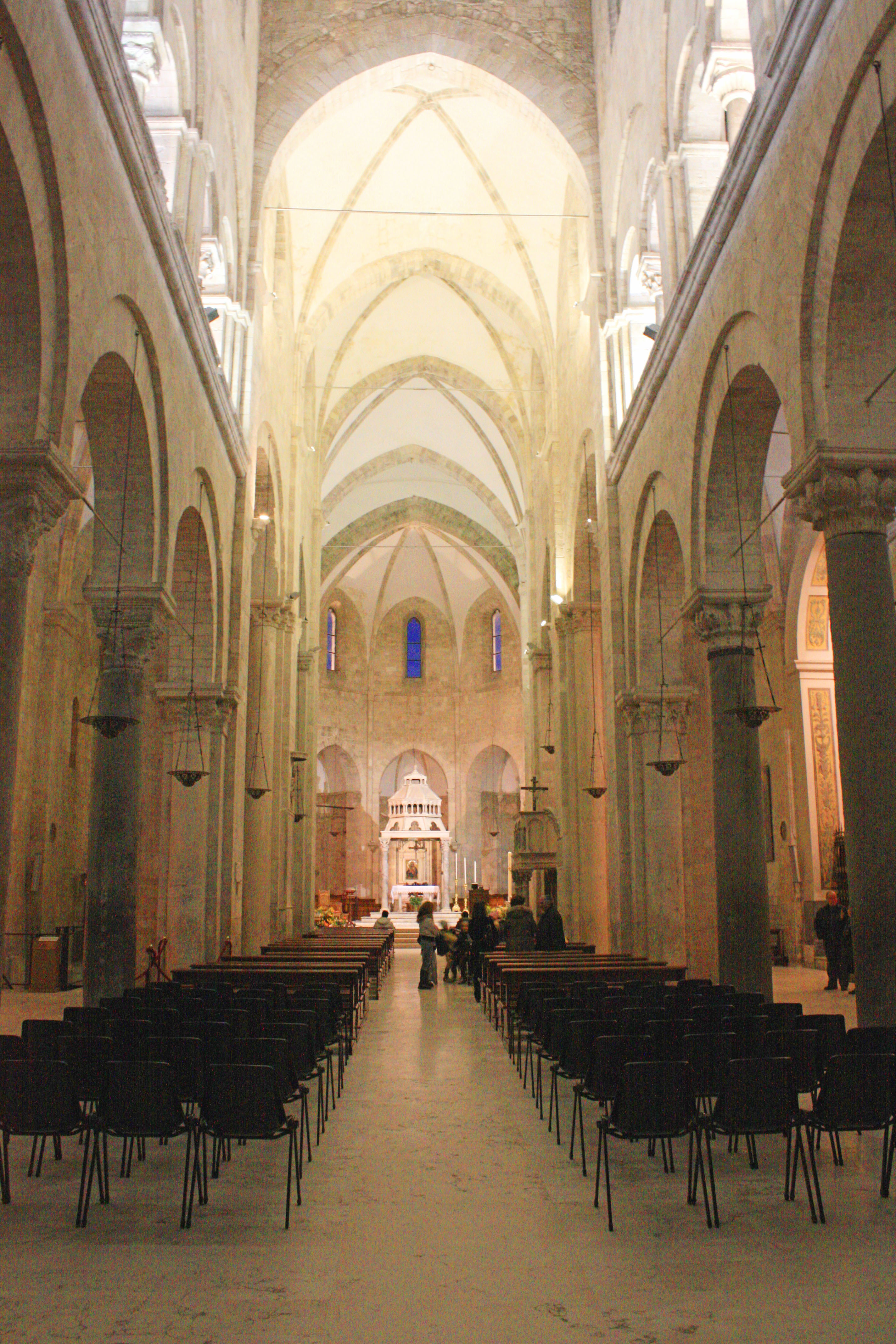 Barletta: Cattedrale di Santa Maria Maggiore - L'interno di sera